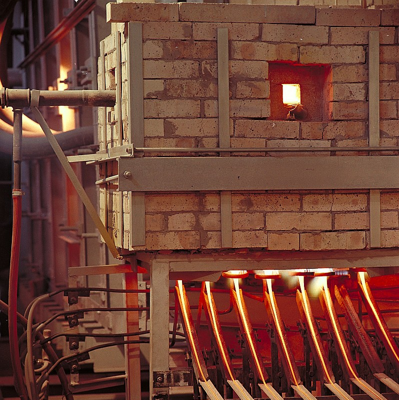 Original image description from the Deutsche Fotothek Facharbeiter für Glastechnik